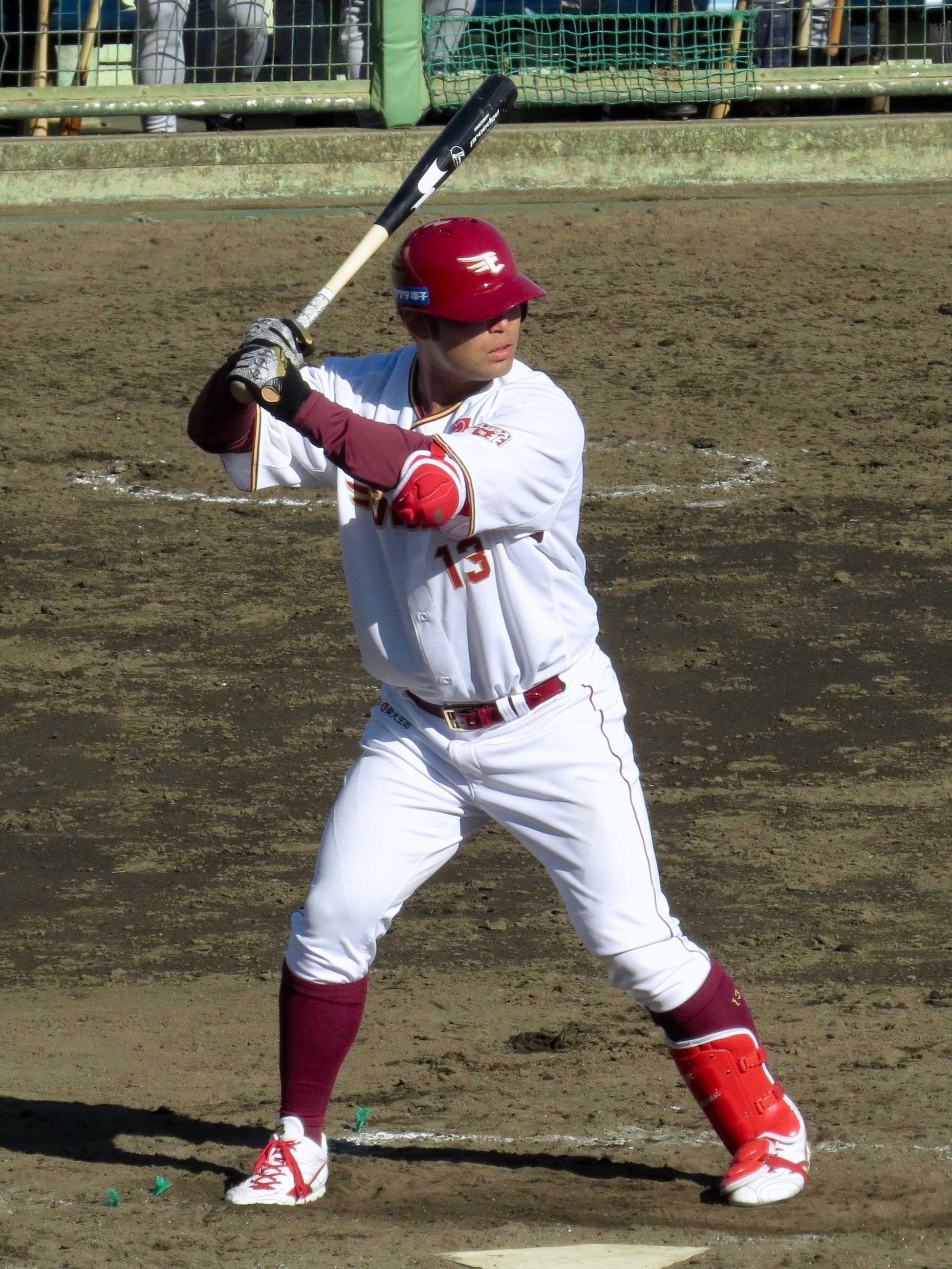 さいたま市営浦和球場にて